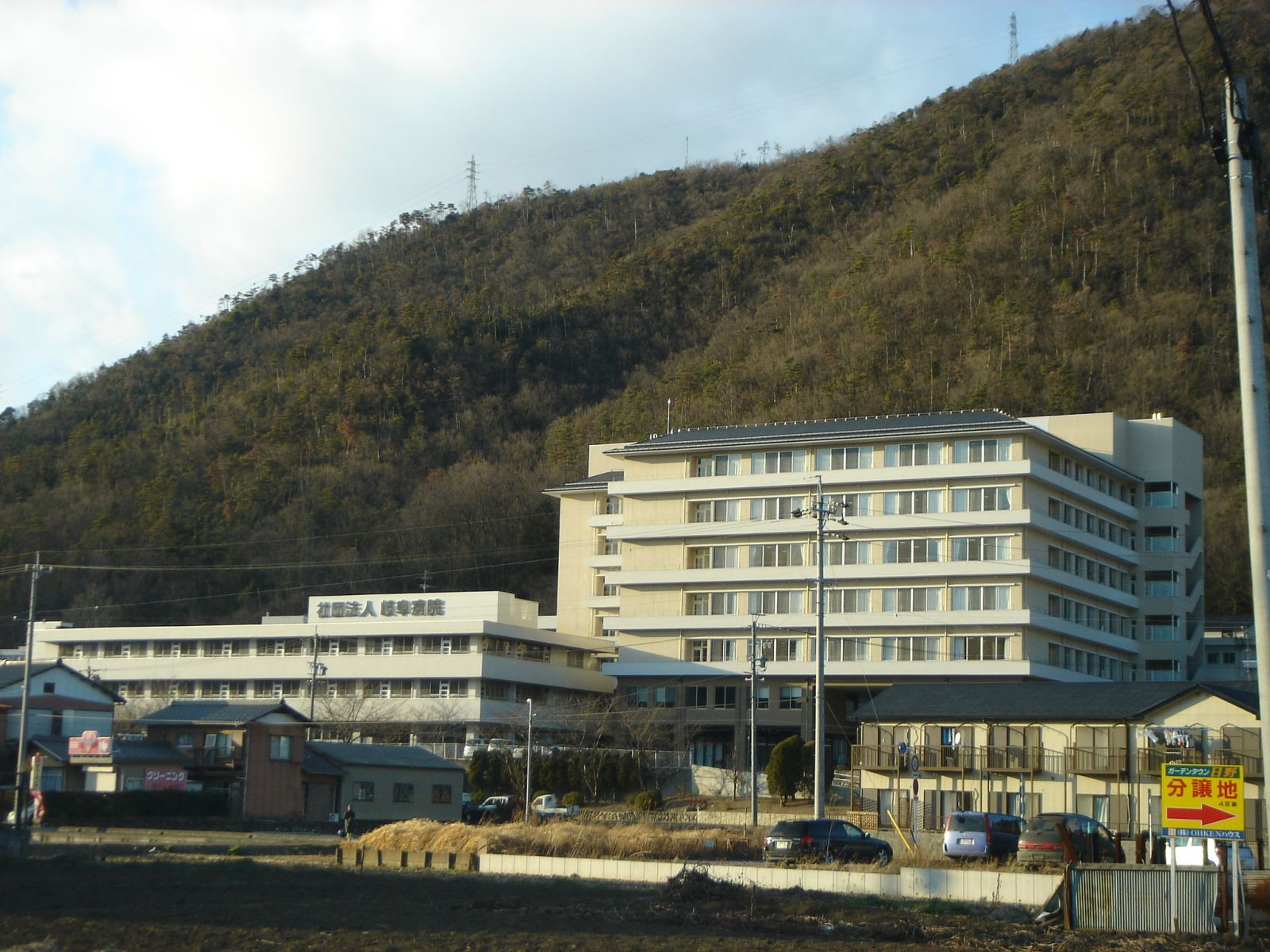 Gifu Hospital（岐阜病院,Gifu,Gifu,Japan(岐阜県岐阜市日野東3丁目)で撮影。